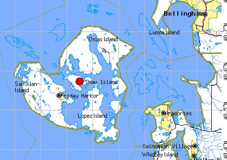 Mapa de la isla Shaw en el archipiélago de las San Juan